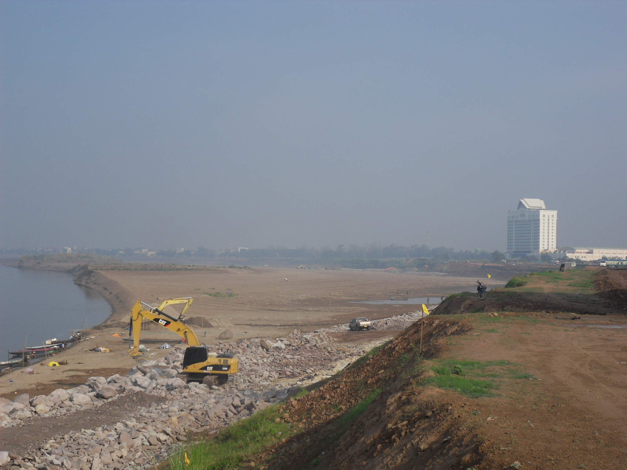 travaux publics à Vientiane